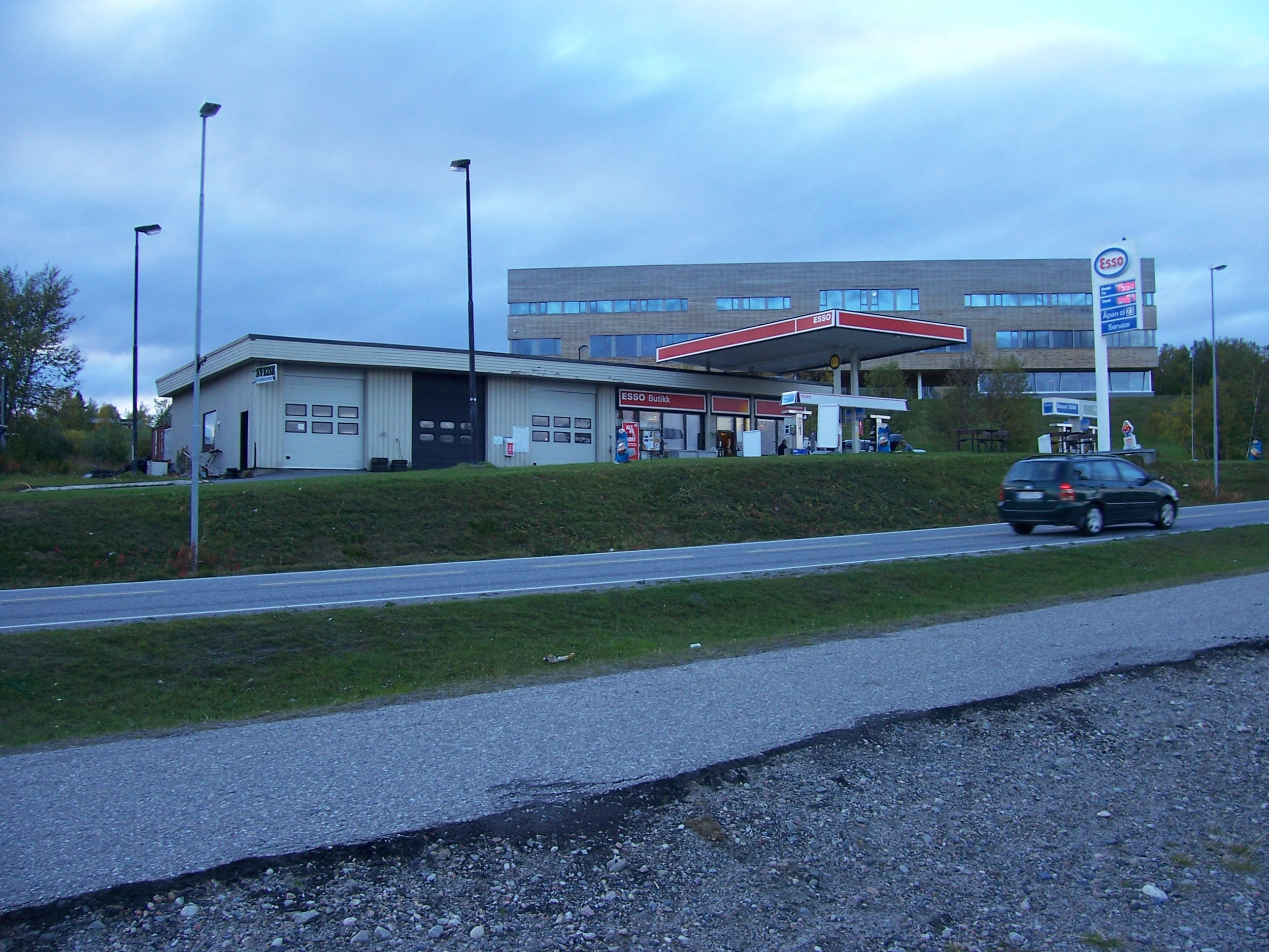 Esso i KautokeinoDavvisámegiella: Esso Guovdageainnus